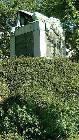 Hessendenkmal in Frankfurt/Main, von 1793 , Denkmal für gefallene Hessen, Standort:Friedberger Landstraße